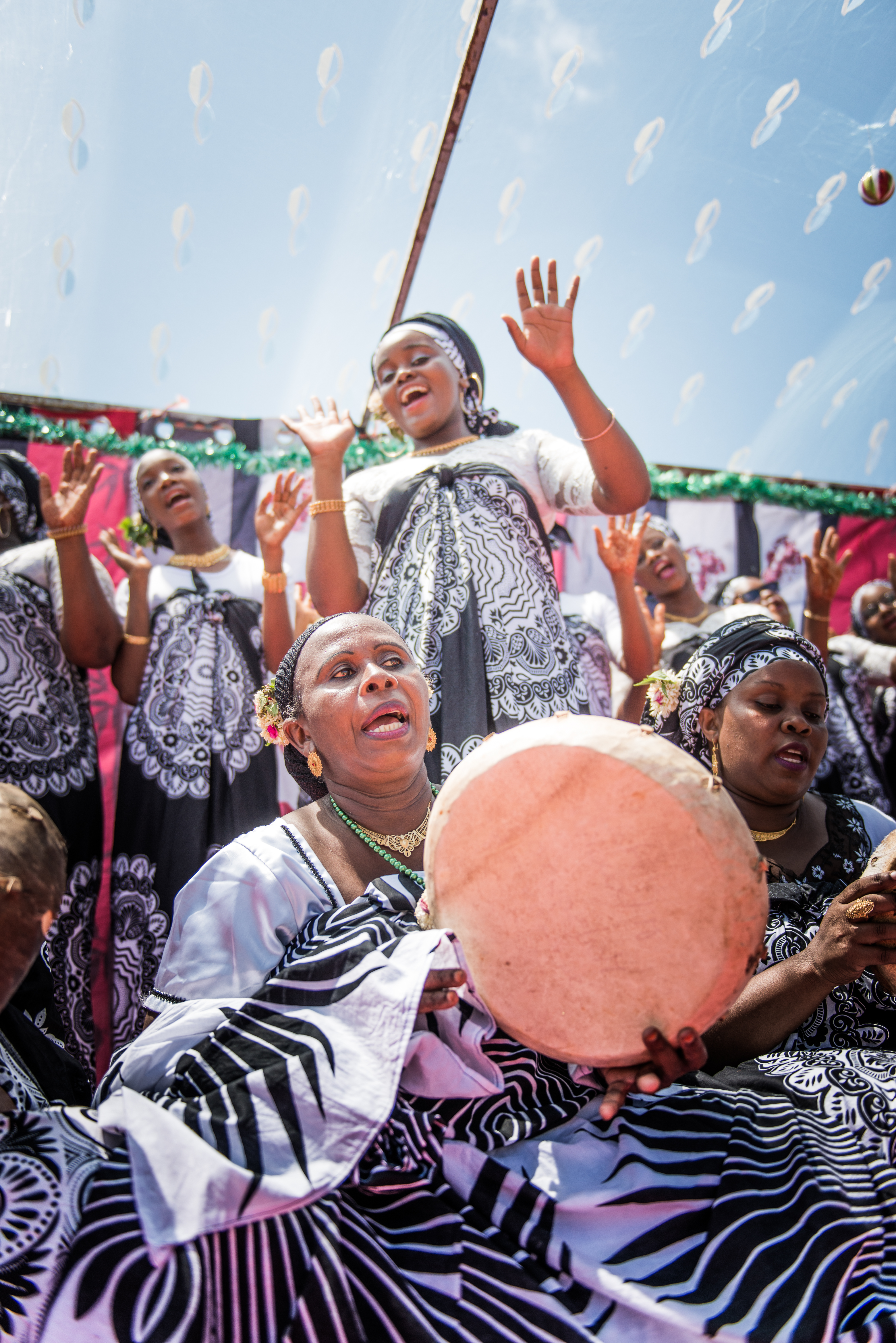 Debaa à Mayotte Le debaa est une danse traditionnelle de l'île de Mayotte réservée exclusivement aux femmes.